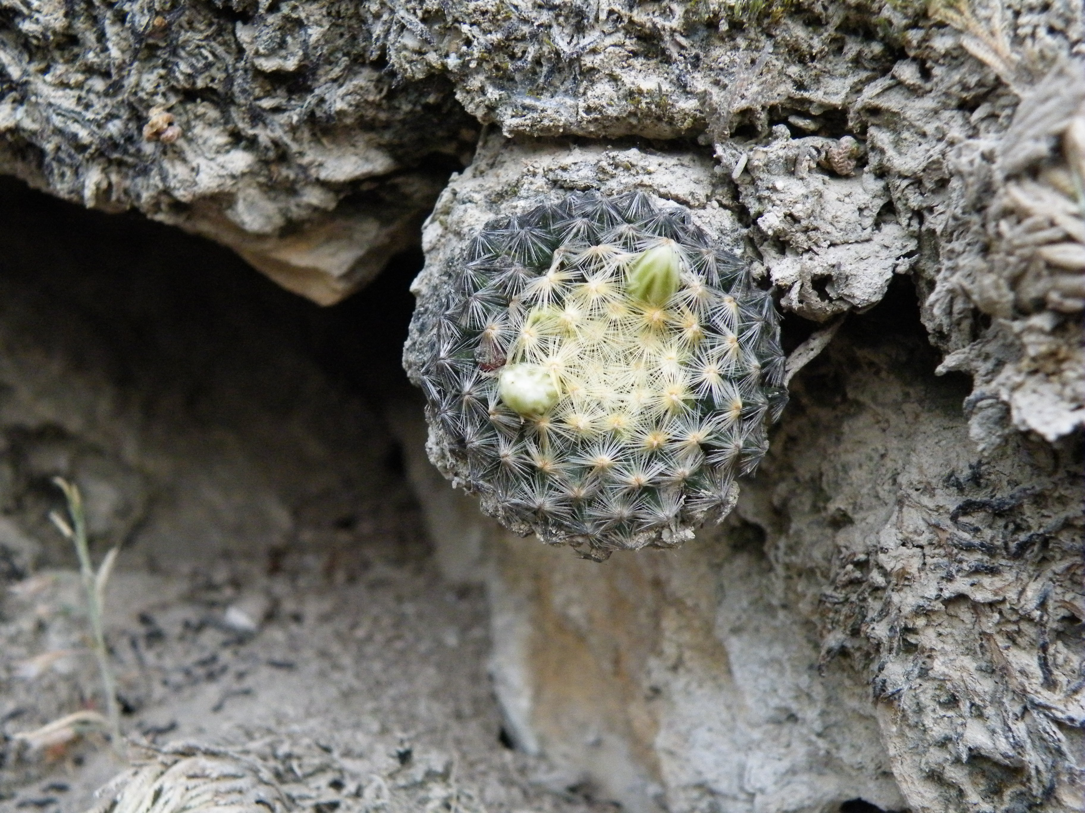 Xichu, Guanajuato